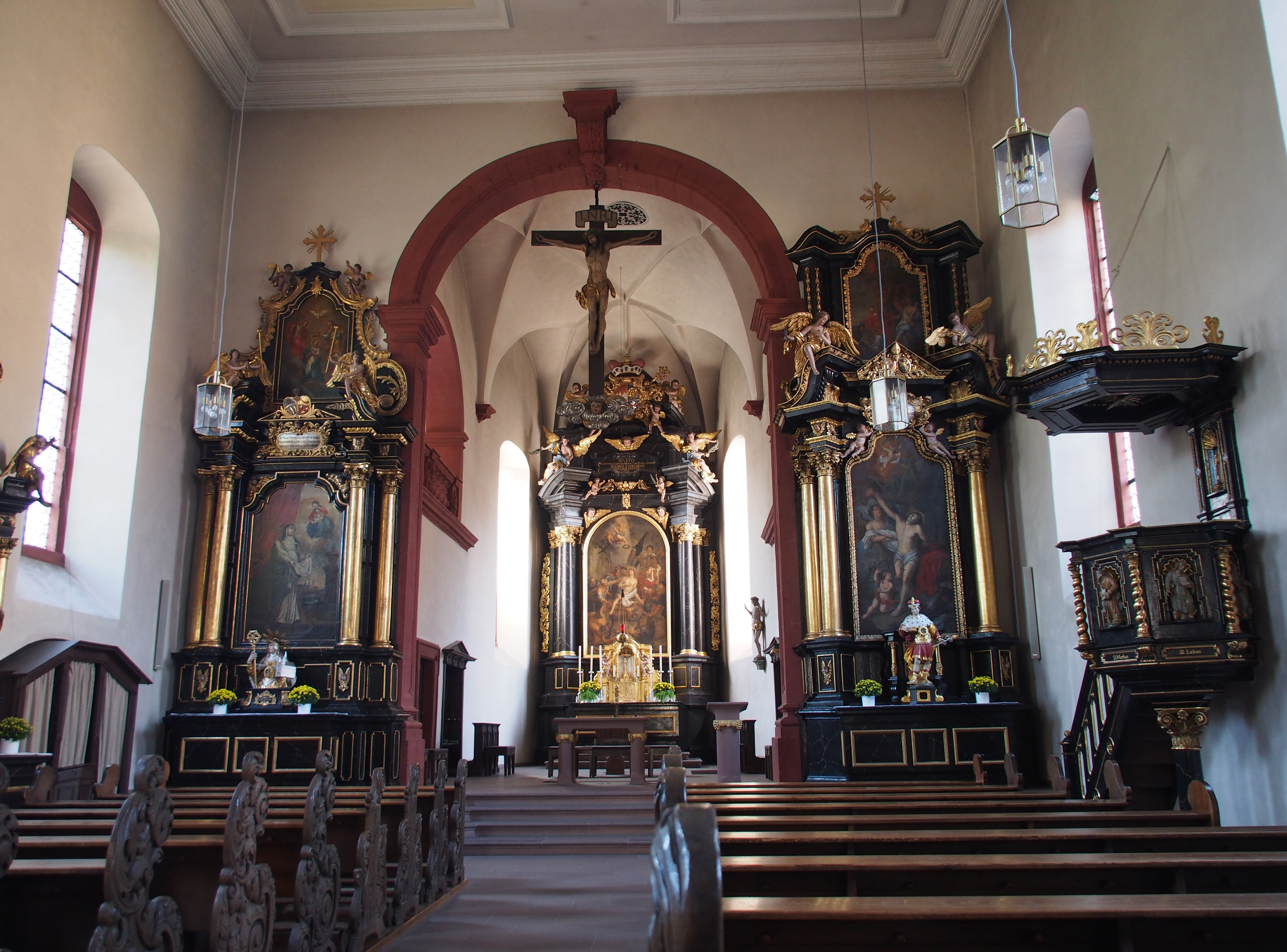 Innenraum mit Altar der Kirche St. Vitus in Veitshöchheim (Unterfranken)